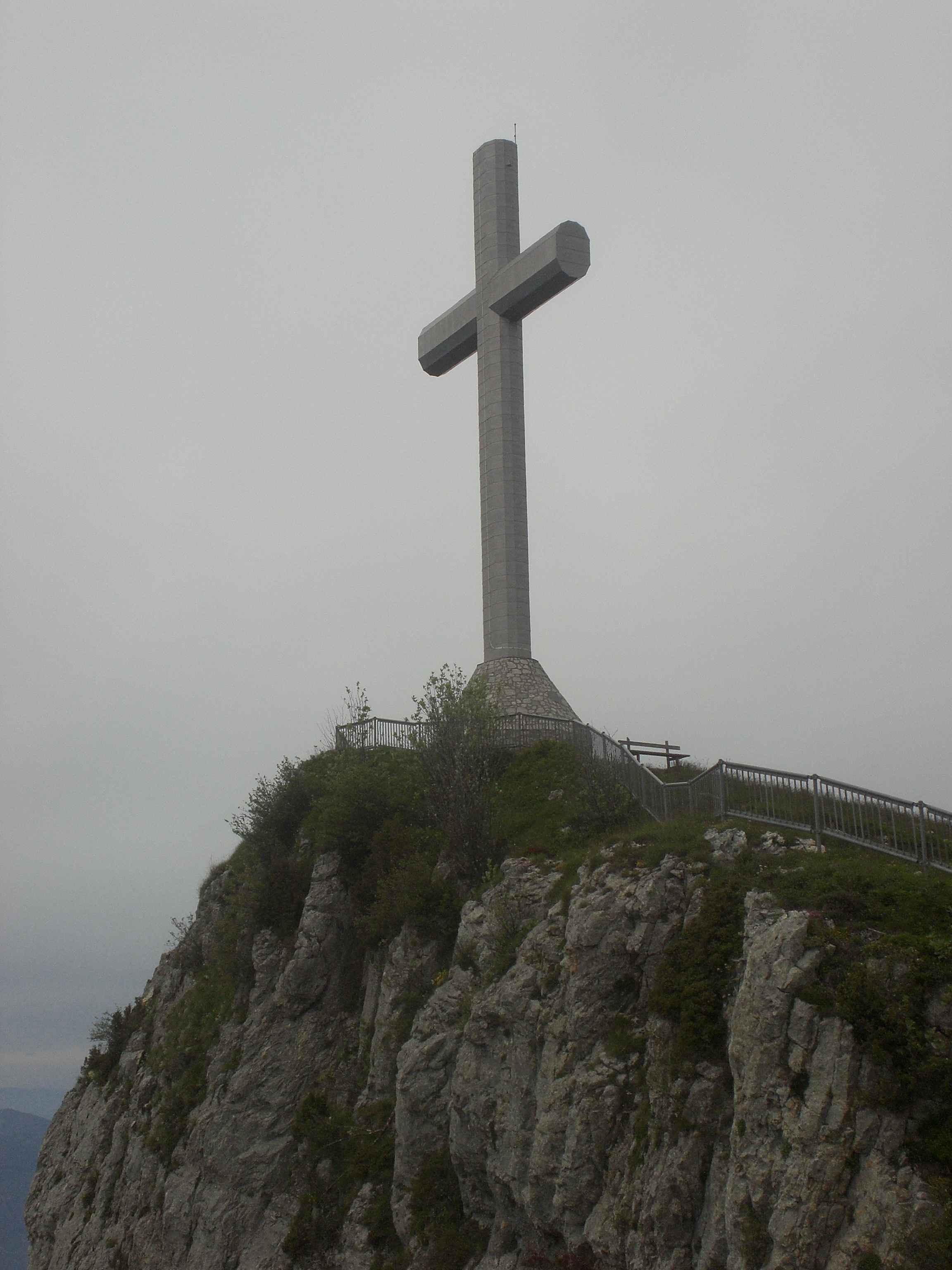 Croix du Nivolet